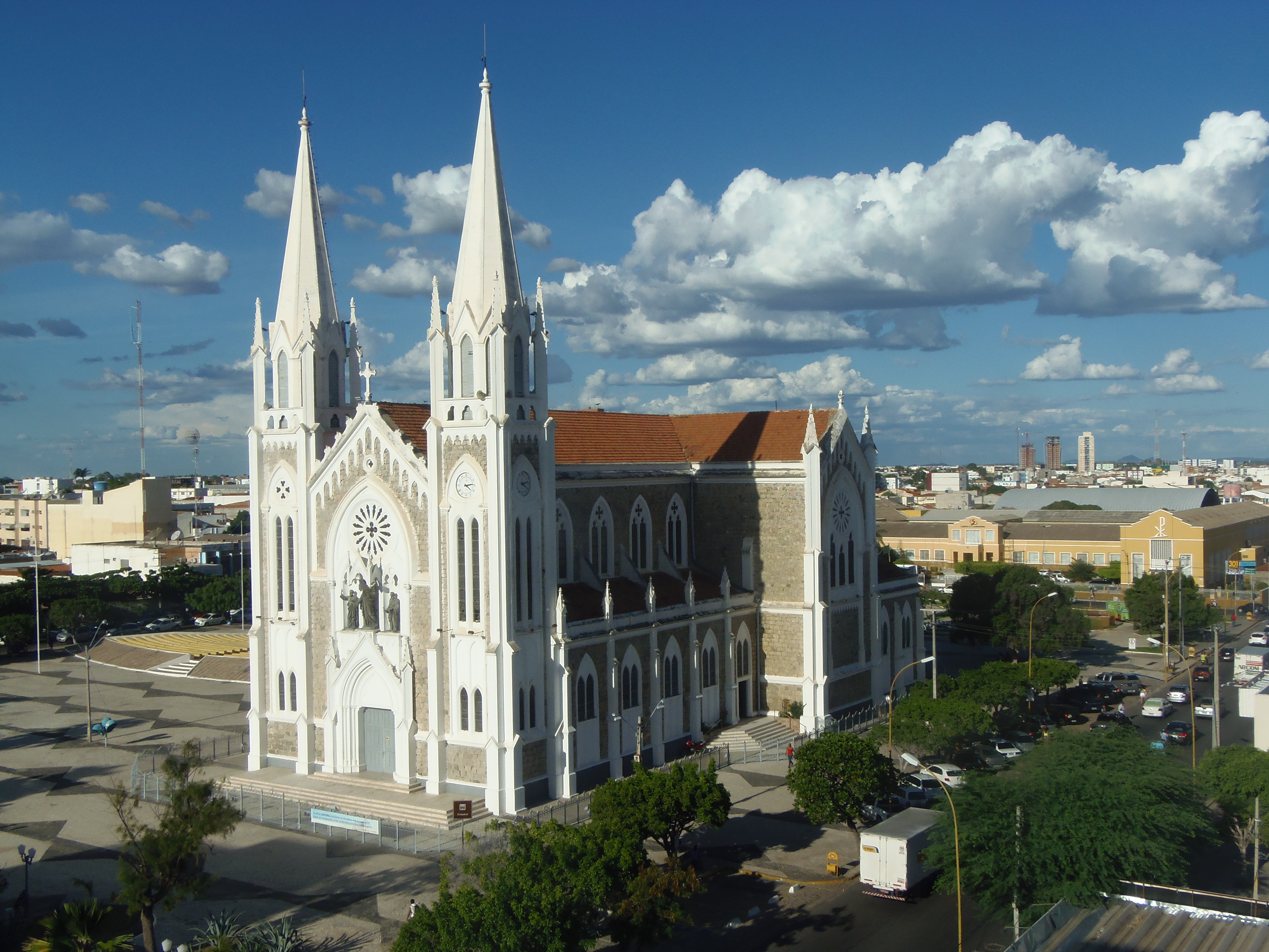 Centro, Petrolina - PE, Brazil